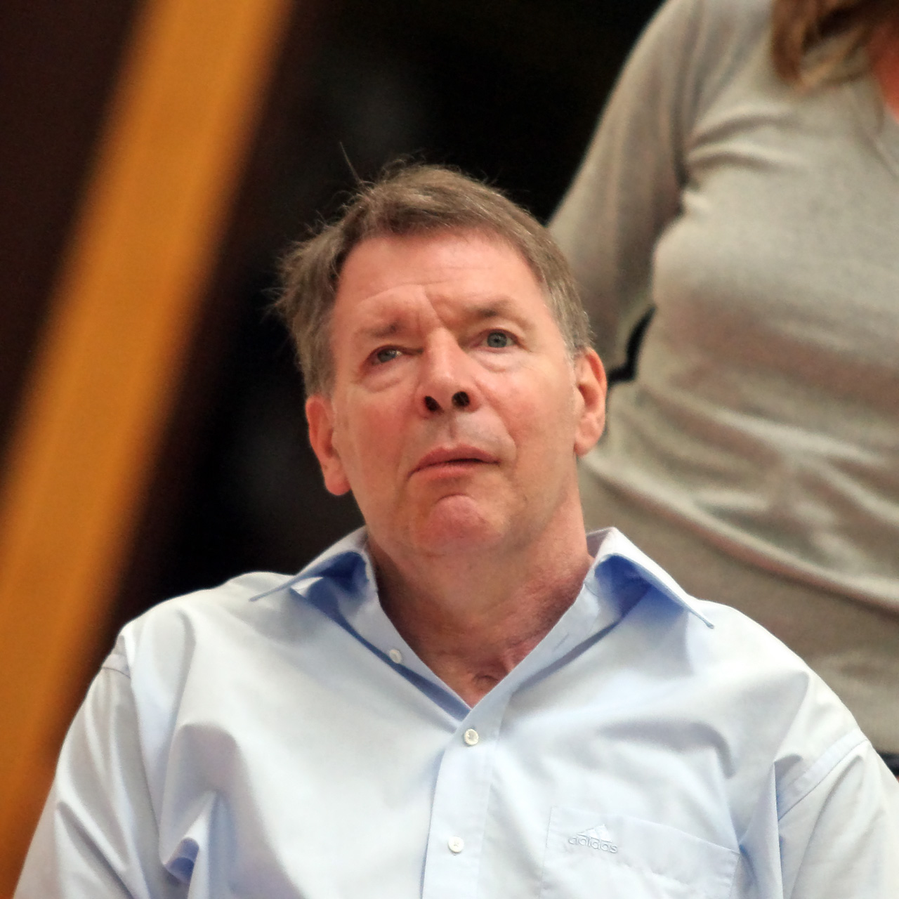 Joachim Deckarm, Handballweltmeister von 1978, am 16. Mai 2009 vor dem Play-Off-Finalspiel der 2. Handballbundesliga zwischen der HSG Bensheim/Auerbach und dem VfL Sindelfingen der Bensheimer Weststadthalle.